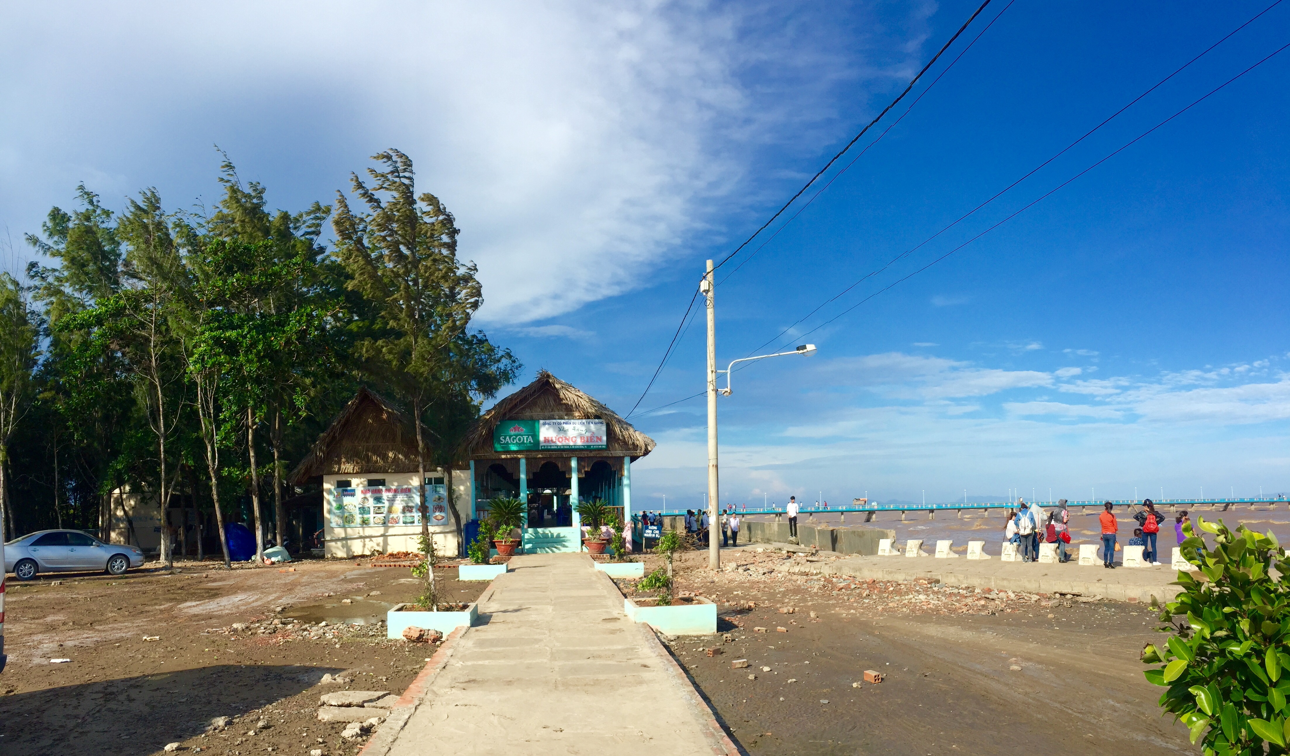 Tân Thành, Gò Công Đông, Tiền Giang, Vietnam